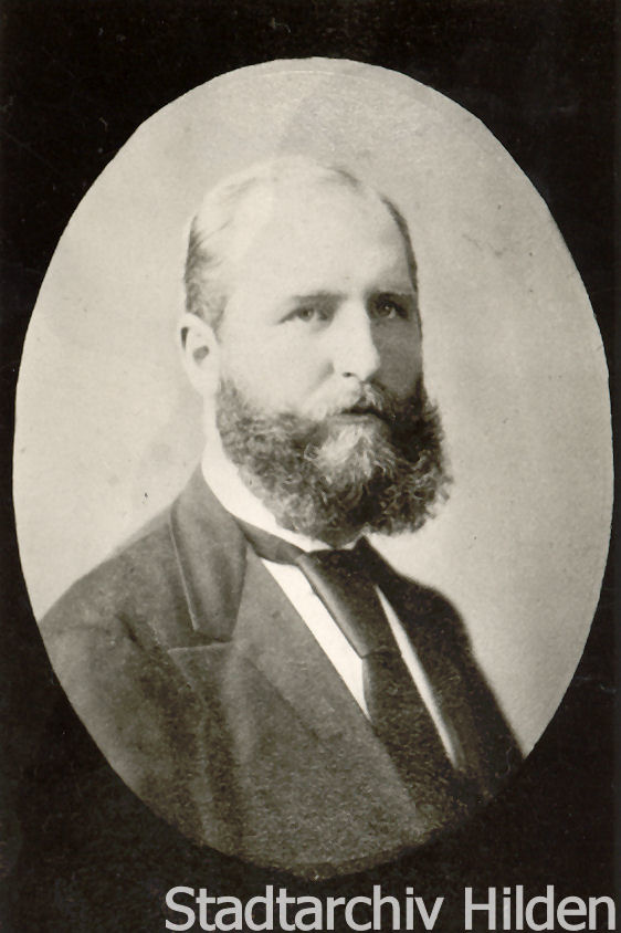 Julius Hüls (*17. Juni 1842 in Blankenheim (Ahr); † 4. Juni 1904 in Duisburg), von 1866 bis 1885 Teilhaber der Maschinenfabrik "Kirberg & Hüls", Hilden